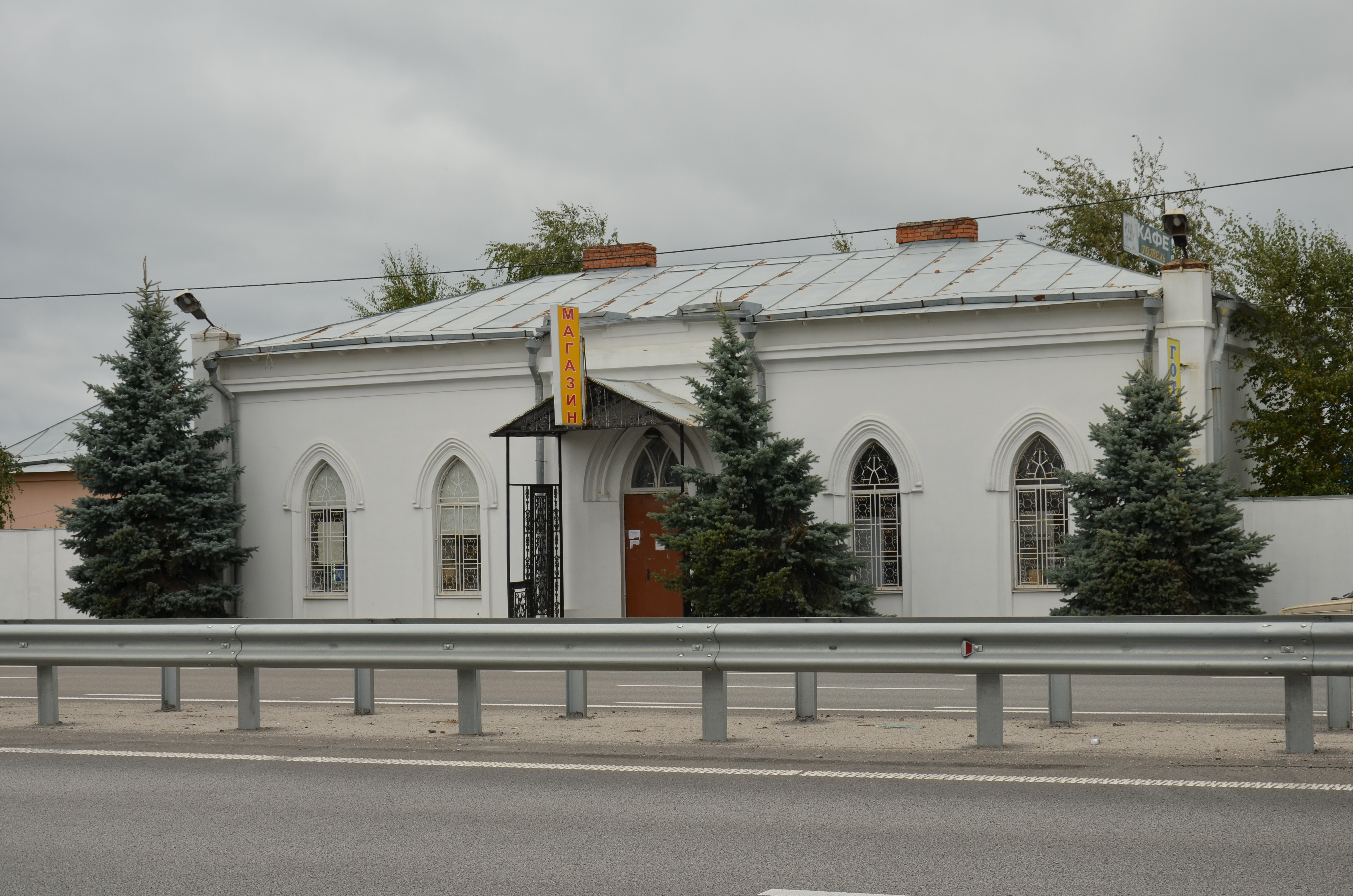 Поштова станція на 32 кілометрі (мур.), село Гурівщина, шосе Київ — Житомир, 32-й км